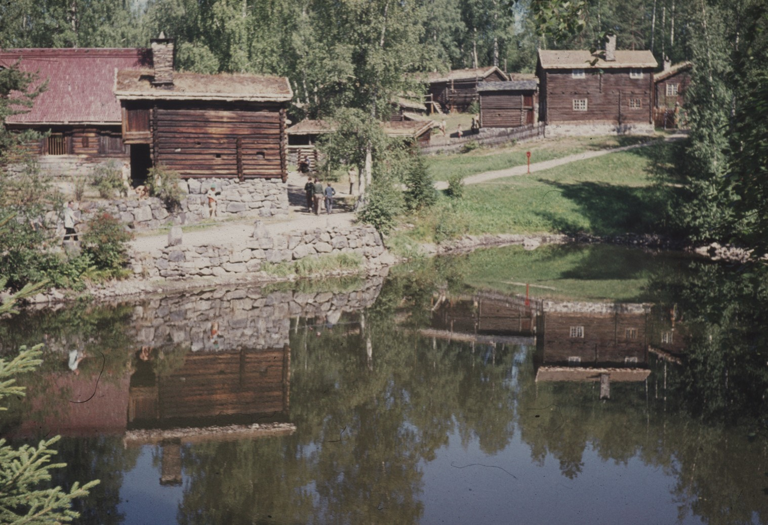 Nordjamb 1975, Freilichtmuseum Maihaugen